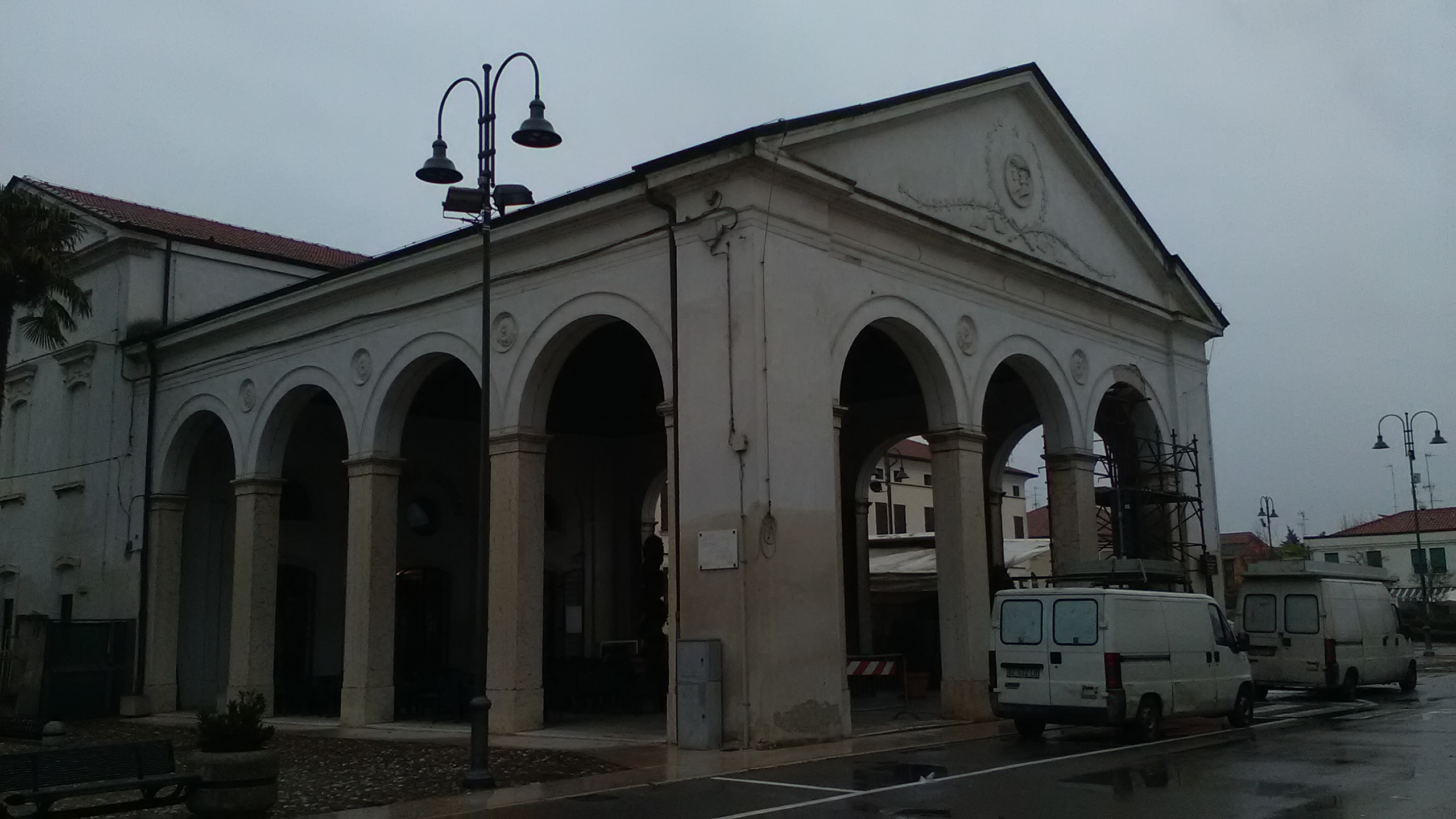 Teatro di Castelmassa